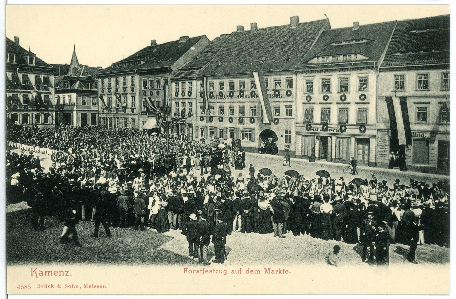 Kamenz; Forstfestzug auf dem Markt This postcard is from publisher Brück & Sohn in Meißen ( This postcard has a unique number 04585 and is available in a higher resolution at the publisher. This images was uploaded in a cooperation project between Wikipedians and the publisher.